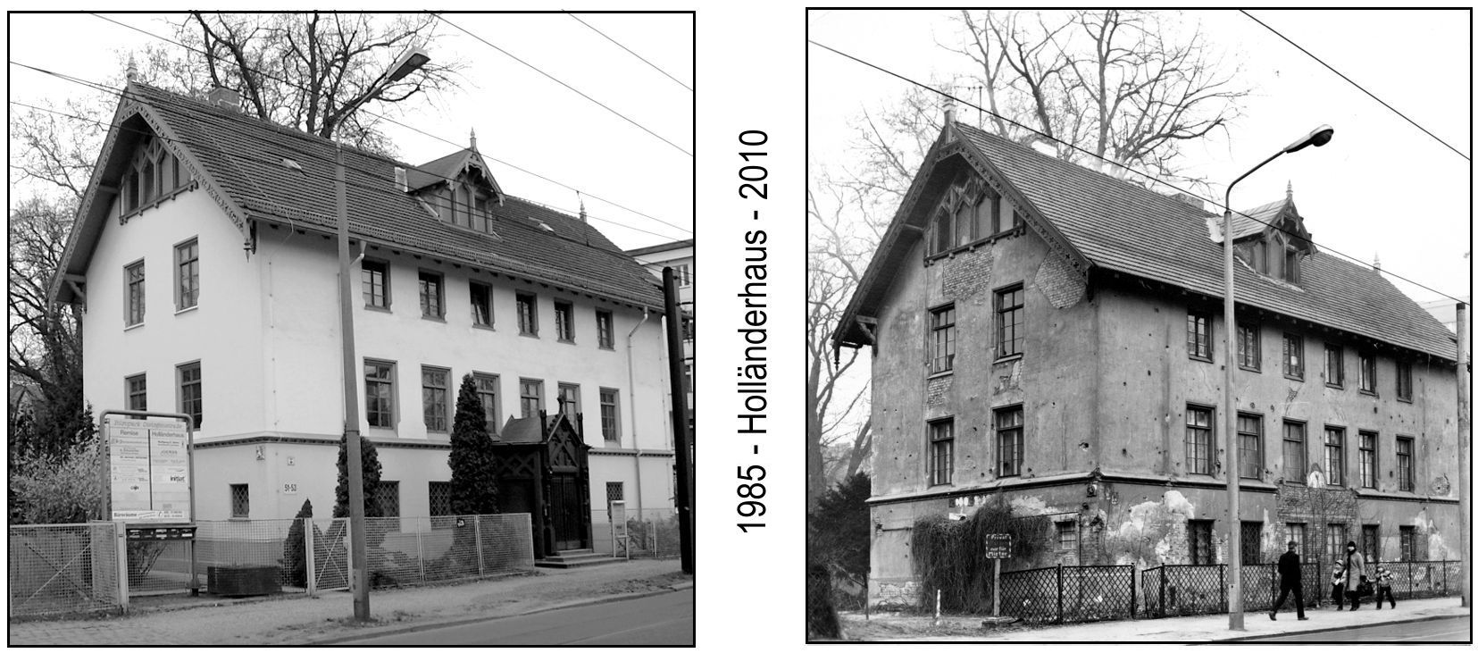 Holländerhaus im Vergleich 1985 und 2010